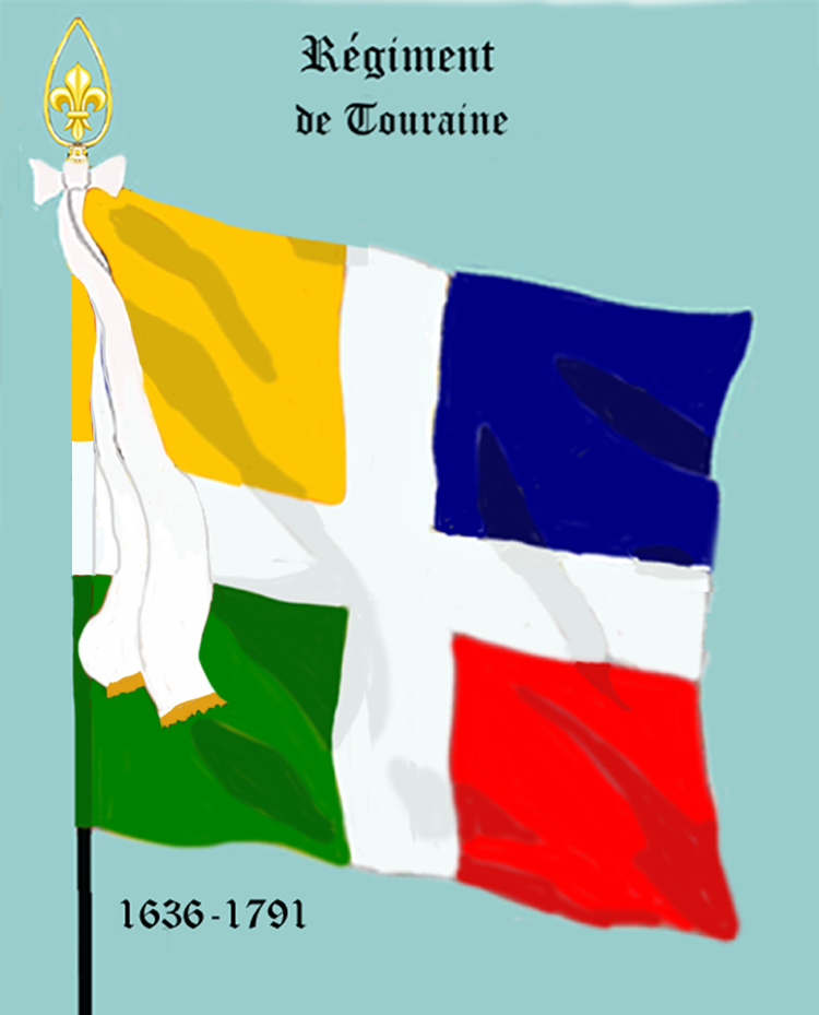 Ordonnanzfahne eines königlich französischen Infanterie-Regiments. - Entnommen und überarbeitet aus: „LES UNIFORMES ET LES DRAPEAUX DE L'ARMÉE DU ROI“ Marseille 1899. (Drapeau d'Ordonnance d' un régiment française d'infanterie royale.)